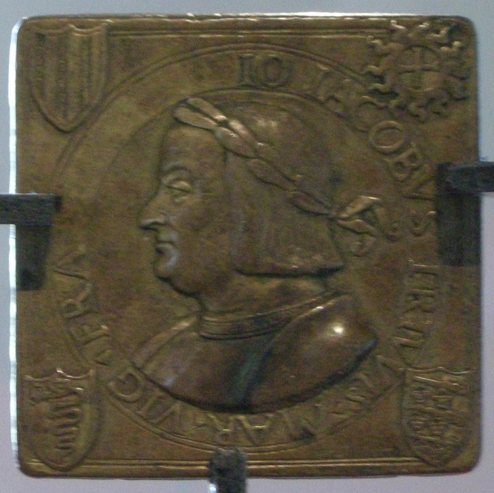 Recto della medaglia con ritratto di Gian Giacomo Trivulzio (1499), opera di Cristoforo Foppa detto "Il Caradosso", conservata nel medagliere della Pinacoteca del Castello Sforzesco di Milano.